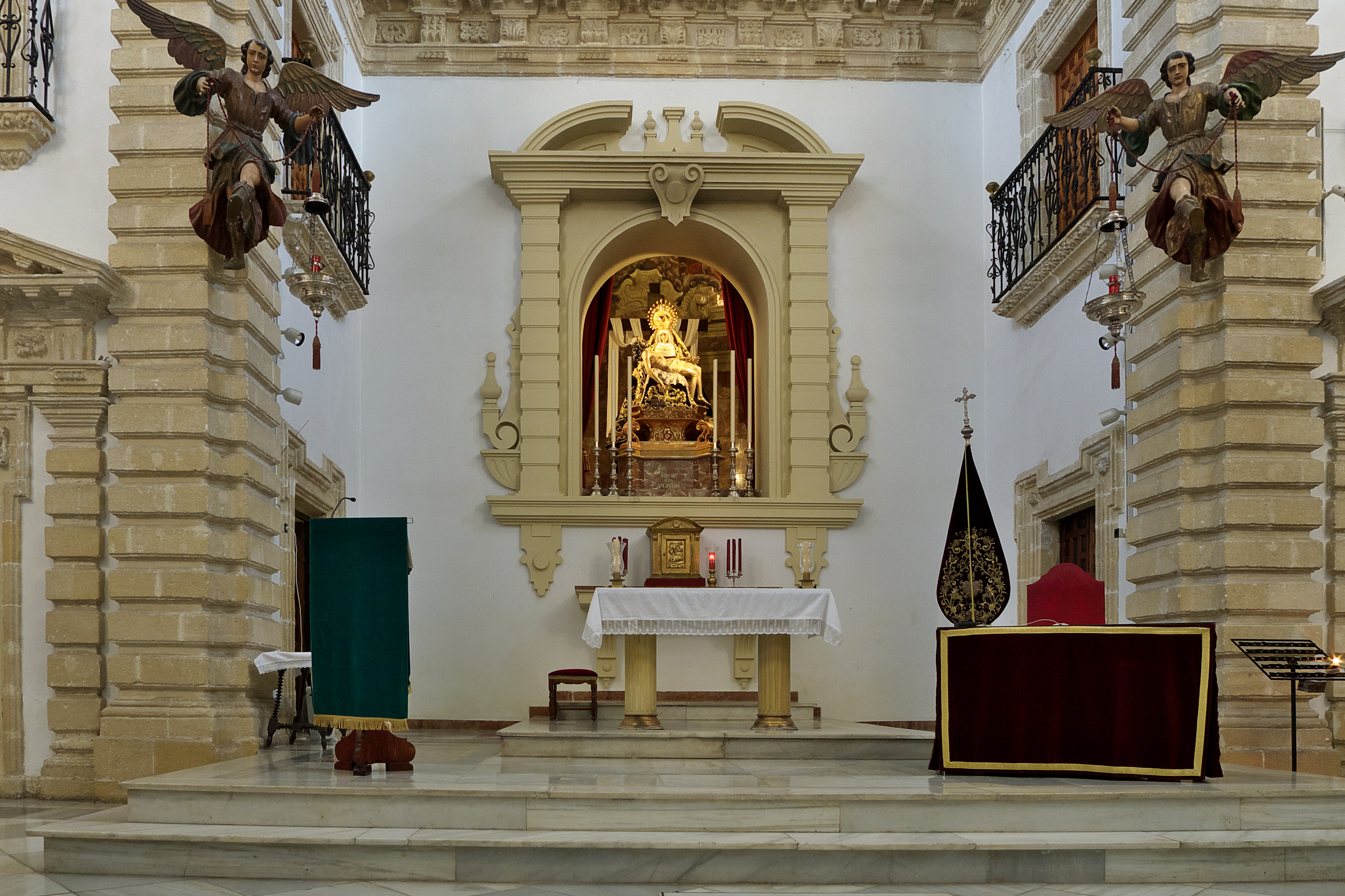 Titular de la Antigua y Venerable Hermandad de Nuestra Señora de la Angustia